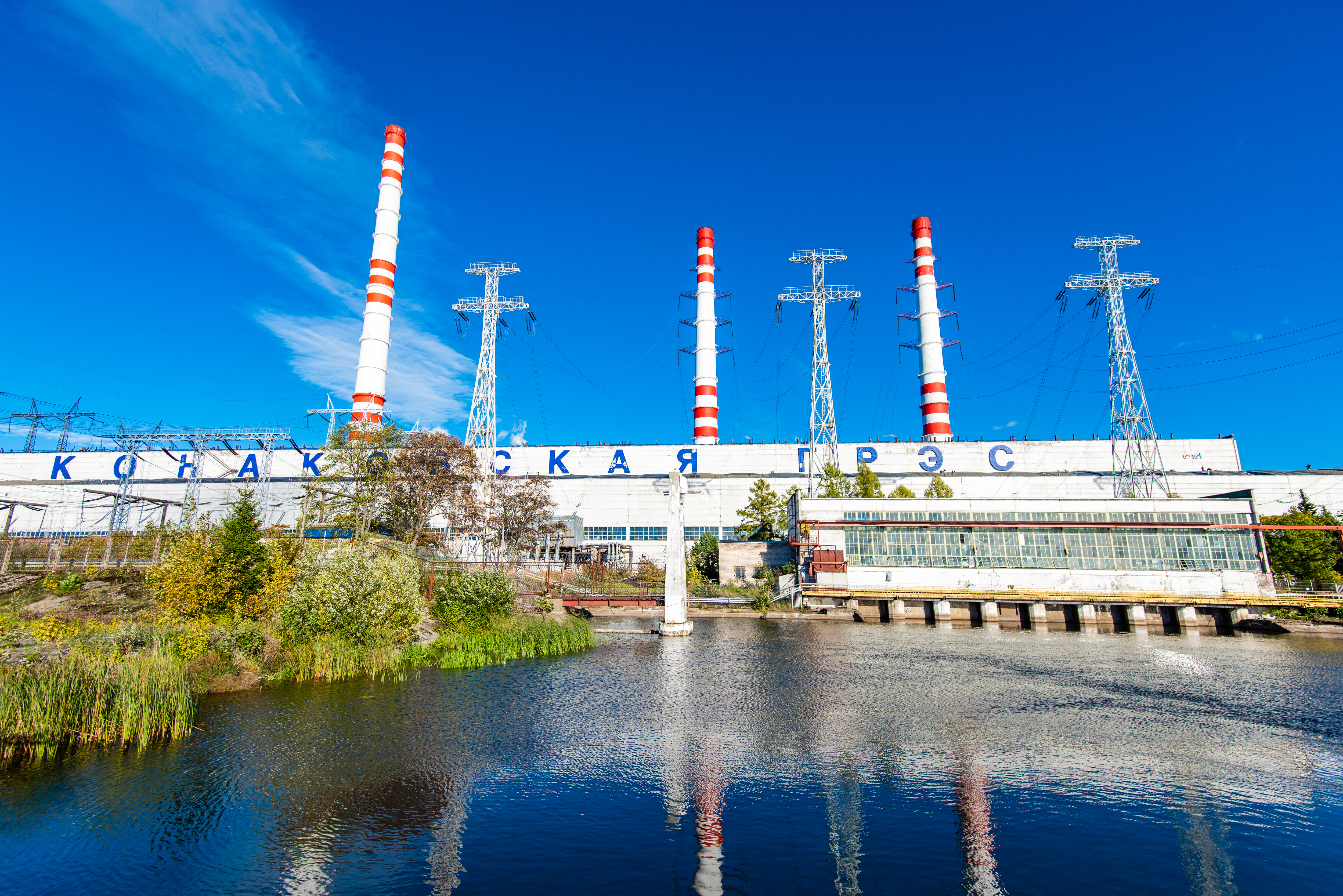 Изображение Конаковской ГРЭС